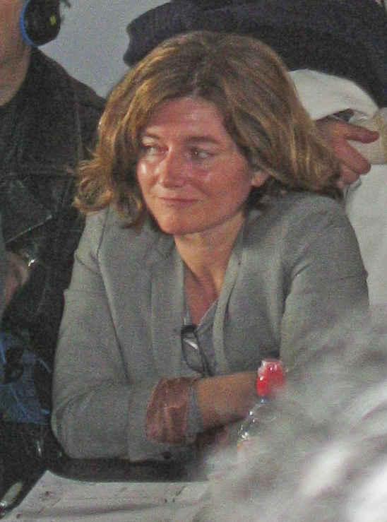 Natalie Nougayrède participant le 15 mars 2014 à une journée porte ouverte au journal Libération et à un débat sur : quelle presse pour demain ?